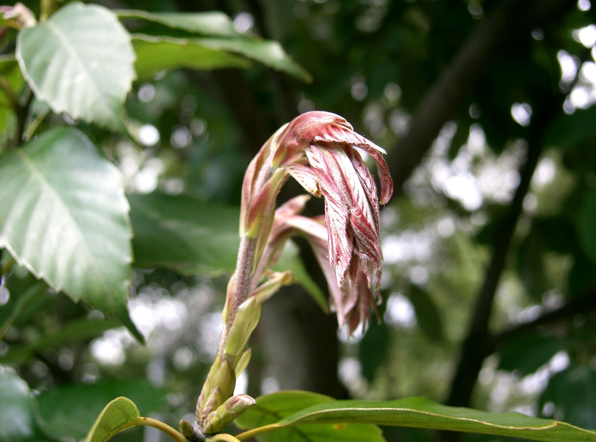 Scientific name Quercus glauca